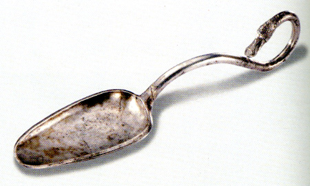 מוויקיפדיה האנגלית, ראו בינוקי יוצר התמונה הוא